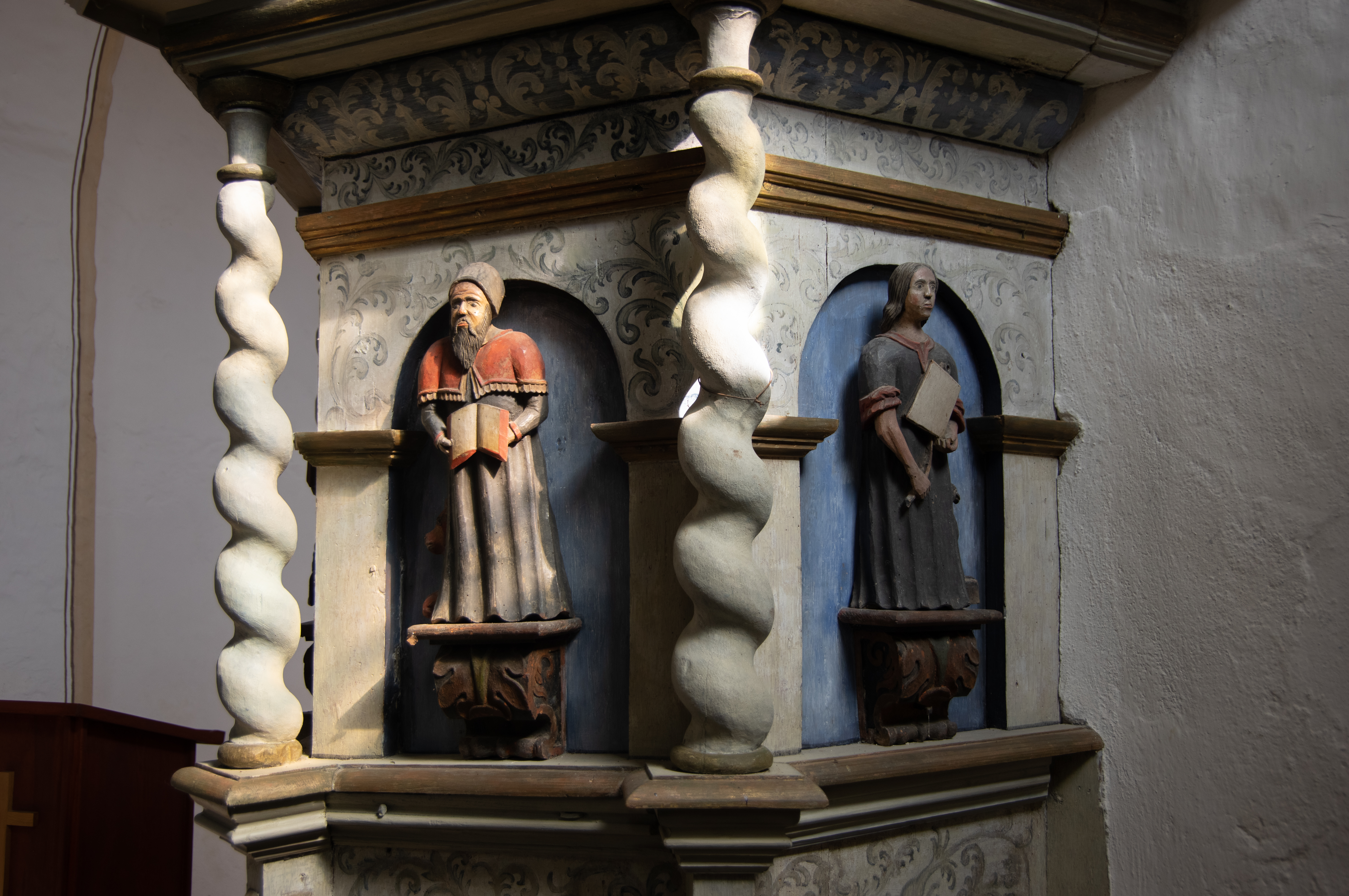 Bad Belzig, Ortsteil Lübnitz in Brandenburg. Die Kirche steht unter Denkmalschutz.